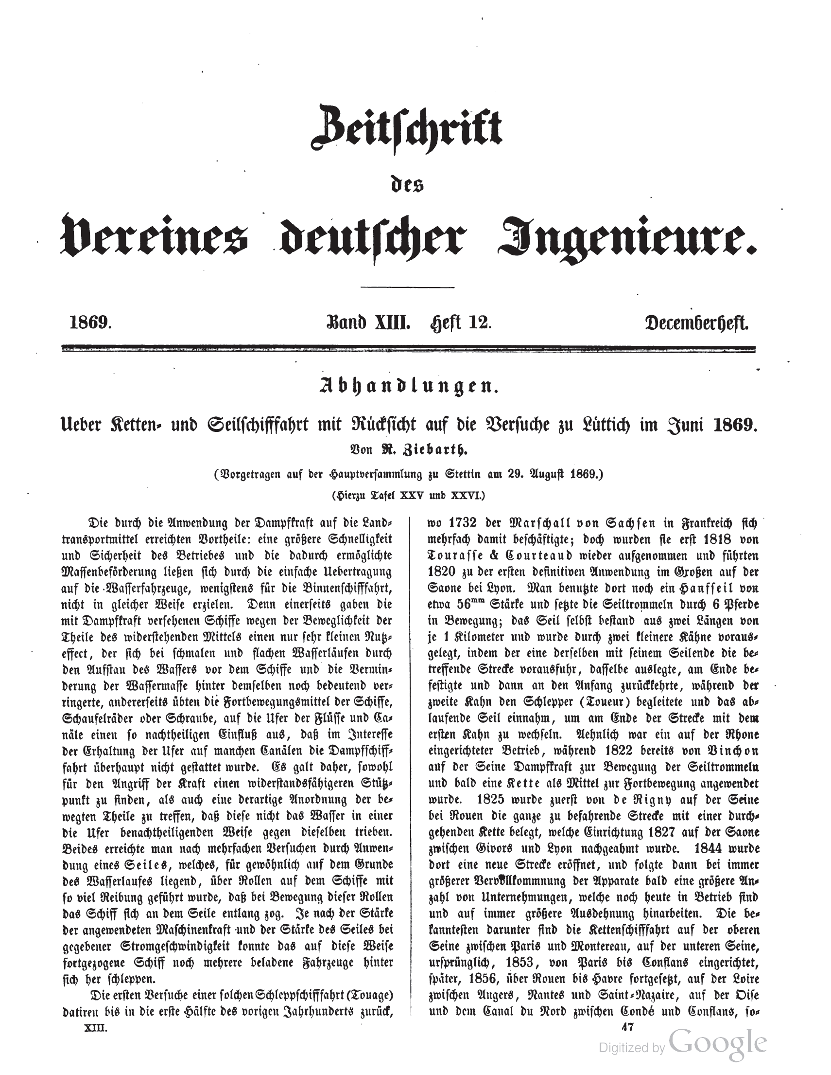 Ueber Ketten- und Seilschifffahrt mit Rücksicht auf die Versuche zu Lüttich im Juni 1869. In: Zeitschrift des Vereins deutscher Ingenieure, Band XIII, Heft 12 , 1869 Seite 737-748, Tafel XXV und XXVI